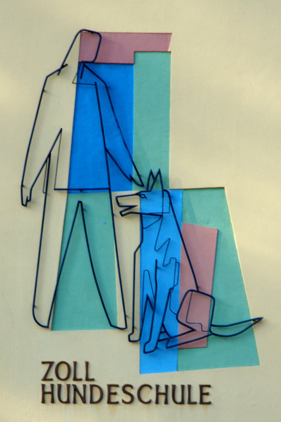 Zollhundeschule Neuendettelsau (Emblem)